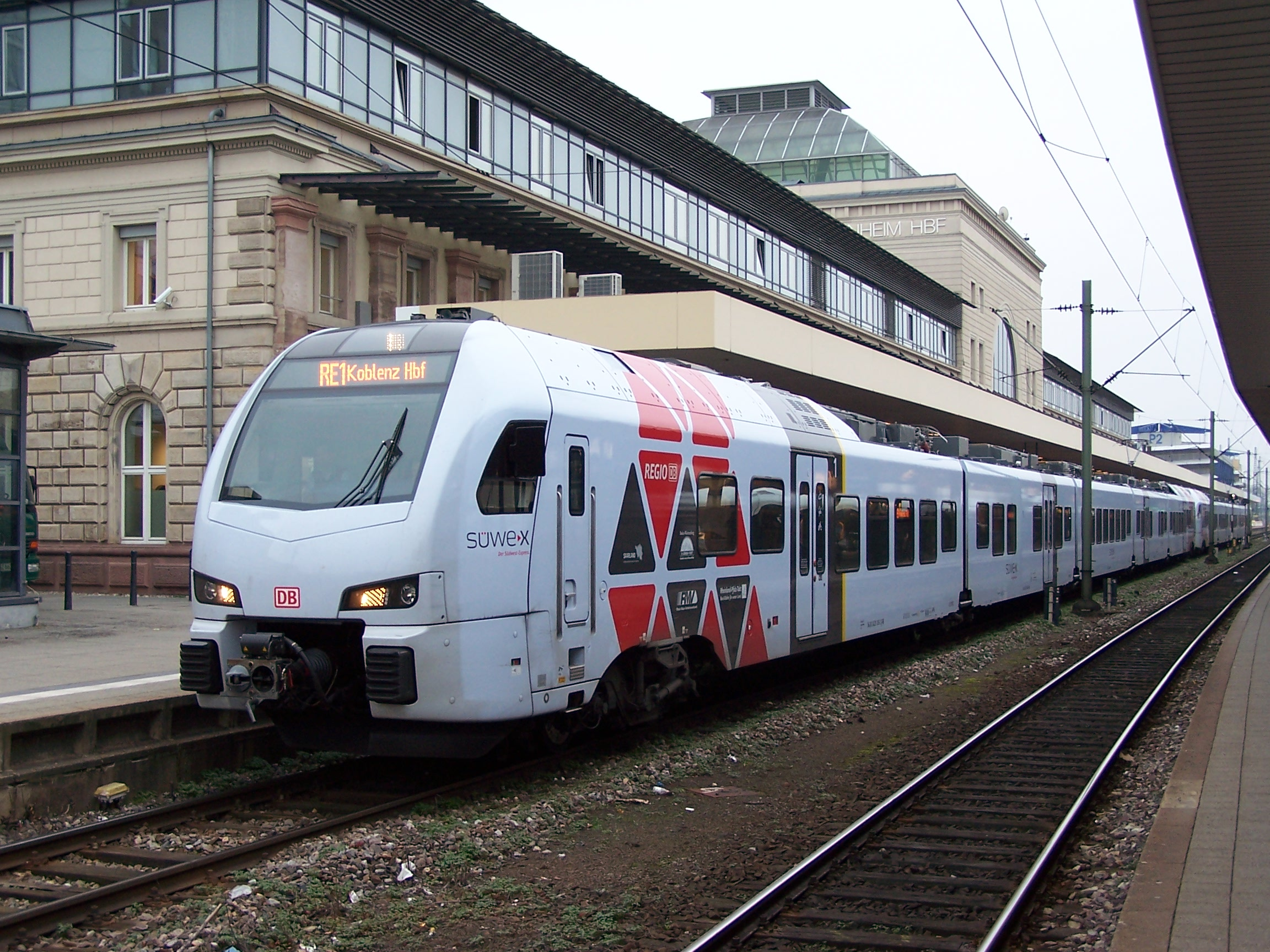 Süwex Flirt (Baureihe 429) der DB Regio AG in Mannheim Hbf.